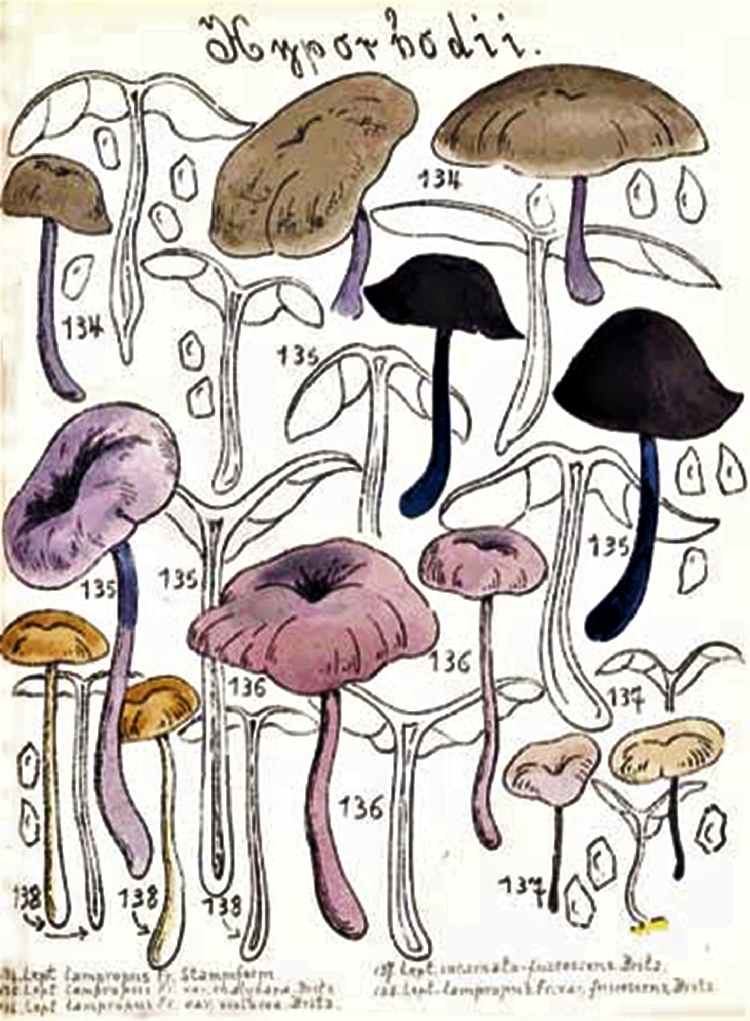 Britzelm.: „Hyporbodii”, 1891, Nr. 134-138